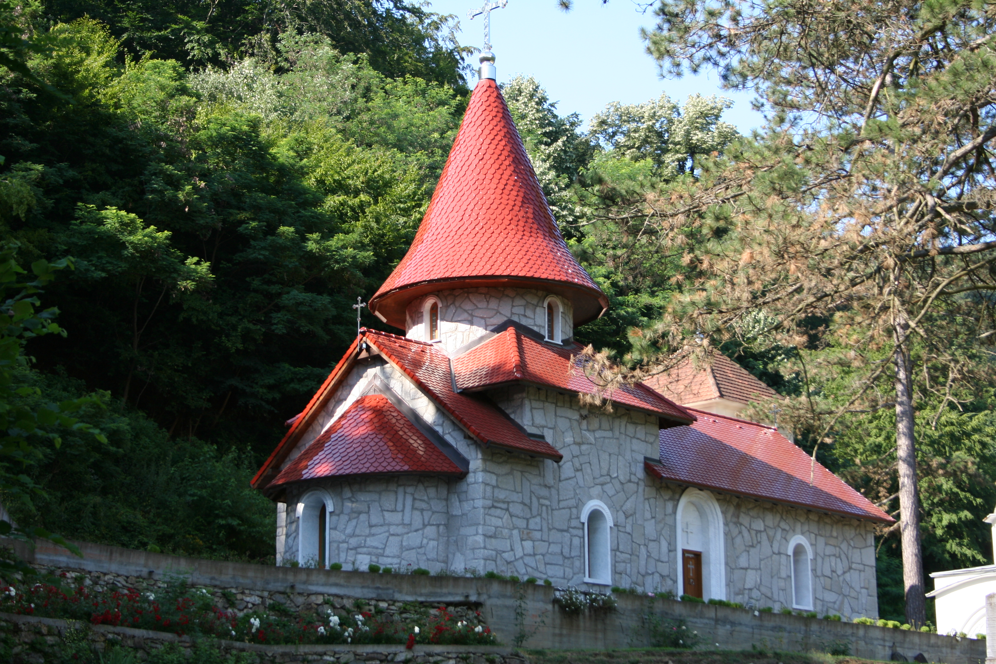 Manastir Radovašnica